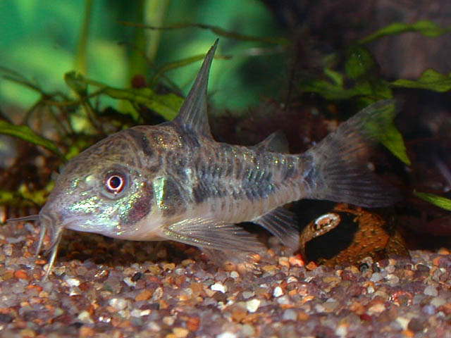 コリドラス・パレアトゥス Corydoras paleatus